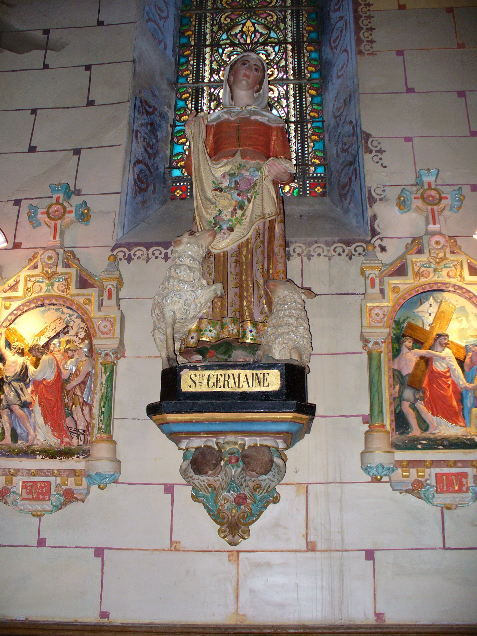 Figur in der Kirche von Rennes-le-Chateau